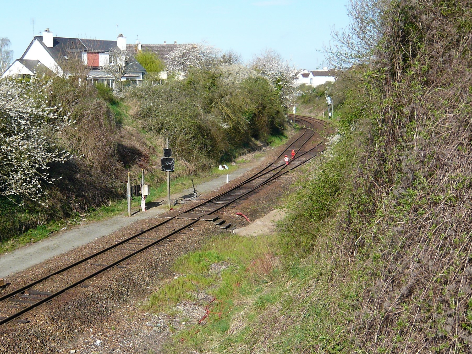 Bifurcation ferroviaire de Mainvilliers, vue du pont de la rue Philarète Chasles, Eure-et-Loir (France) : à gauche, départ de la ligne Chartres-Orléans ; à droite, départ de la ligne Chartres-Dreux.